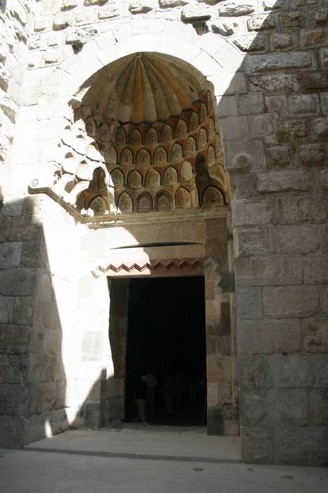 Zitadelle von Damaskus, eigenes Foto von 09/2006, public domain